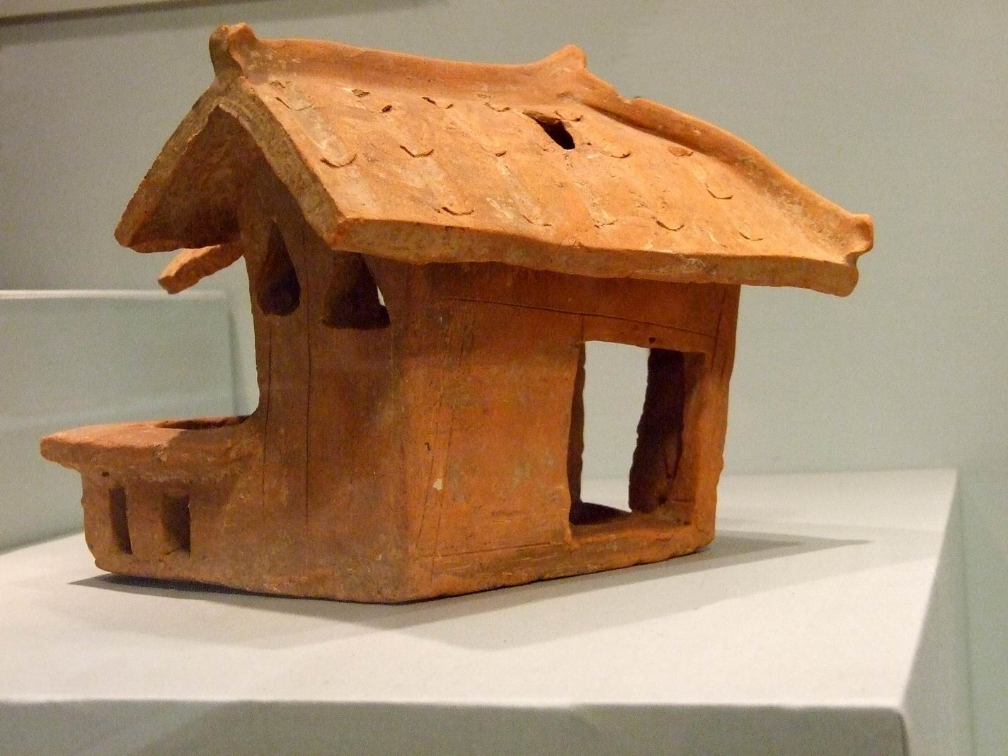 李鄭屋漢墓陶倉模型